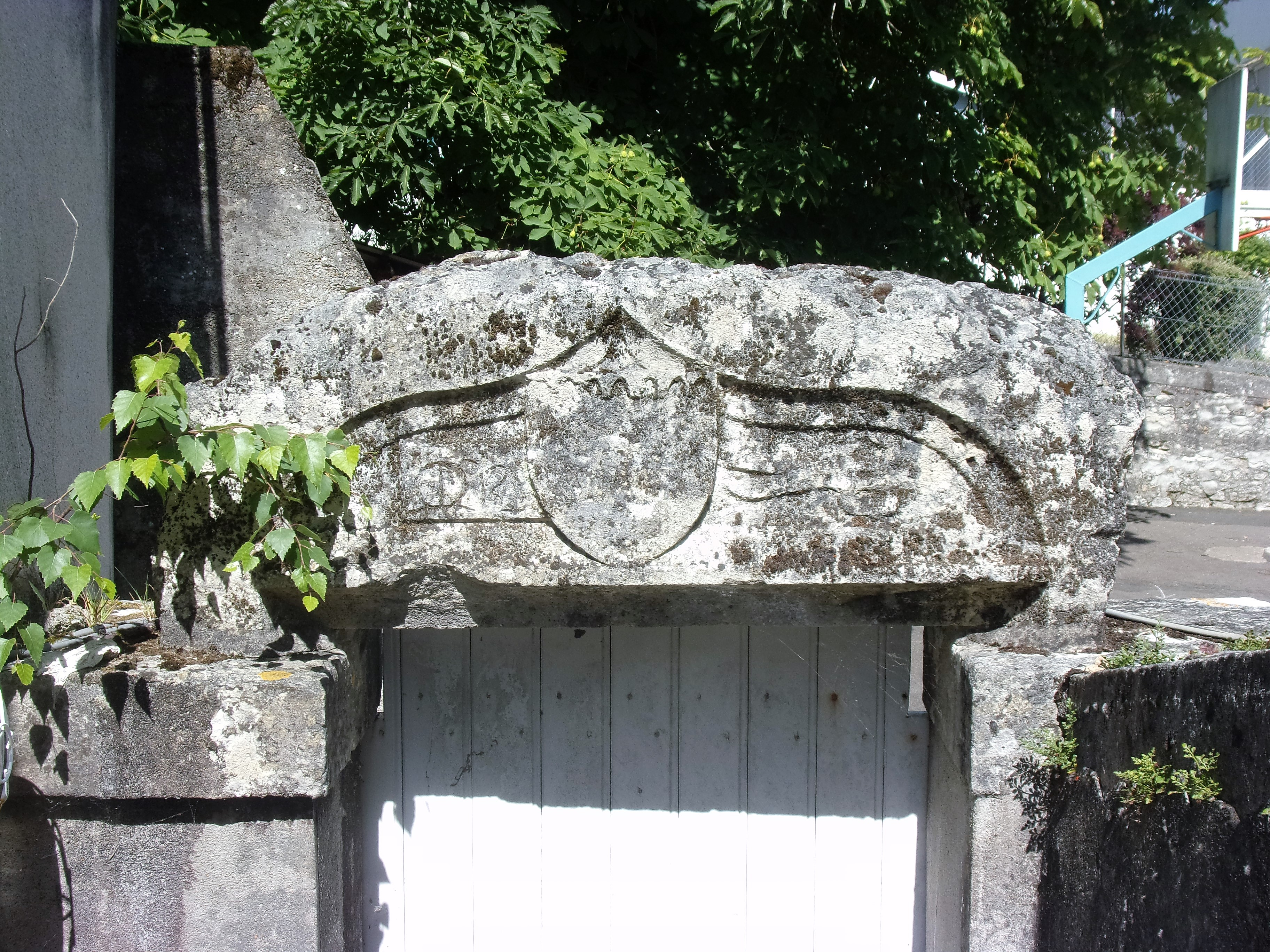 Linteau médiéval de porte en remploi